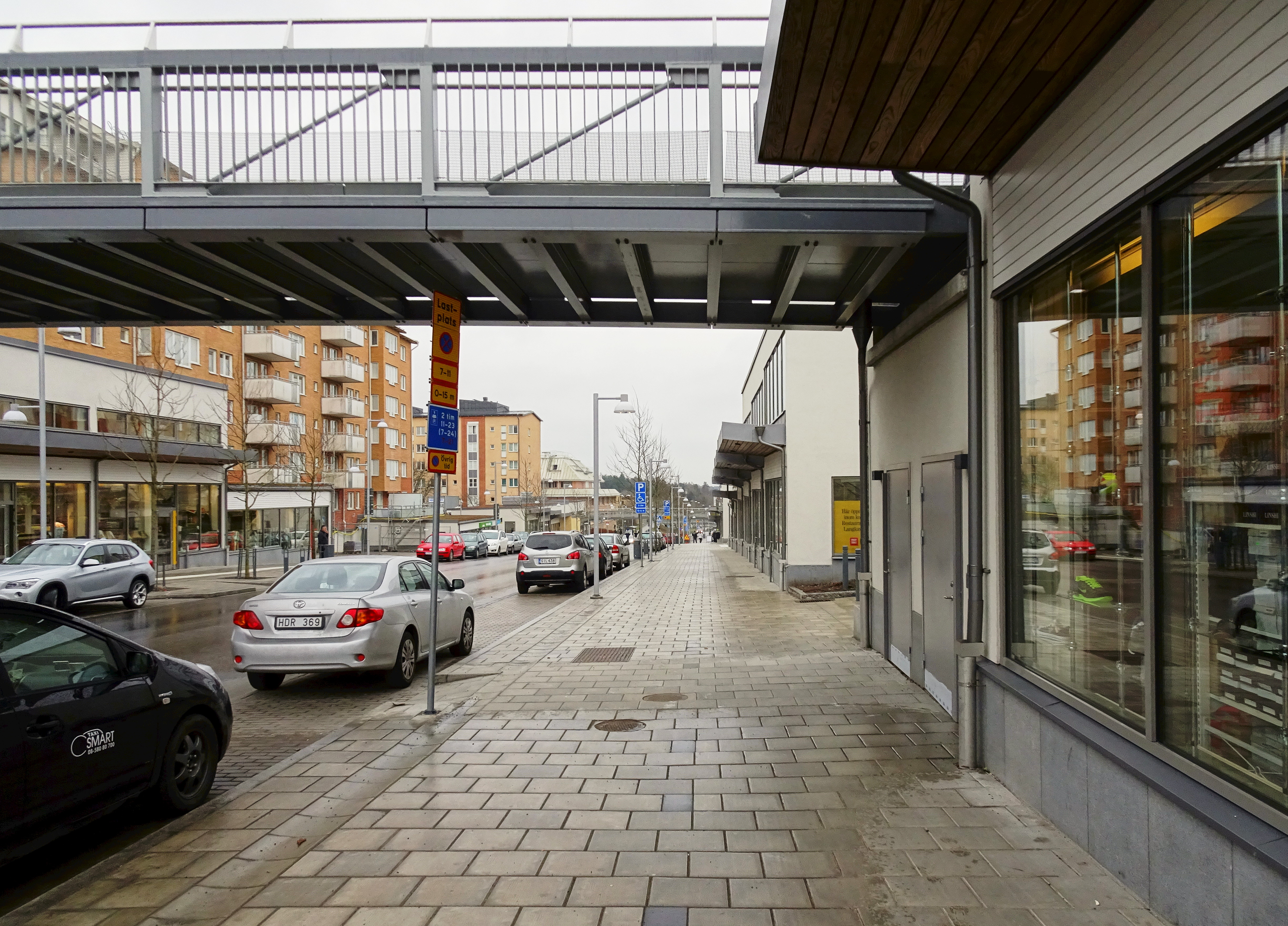 Rinkebystråket, ny bebyggelse, nomonerad till "Årets Stockholmsbyggnad 2016"